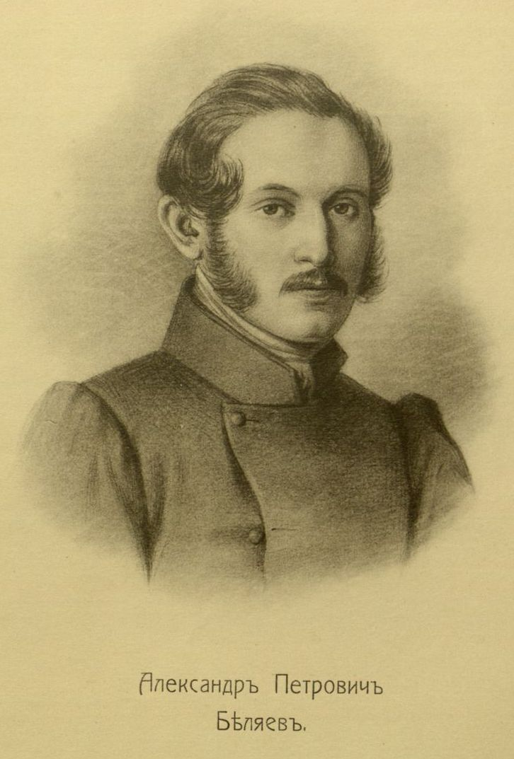 Головачев, П. М. Декабристы : 86 портретов, вид Петровского завода и 2 бытовых рисунка того времени. - М., [1906] Беляев, Александр Петрович